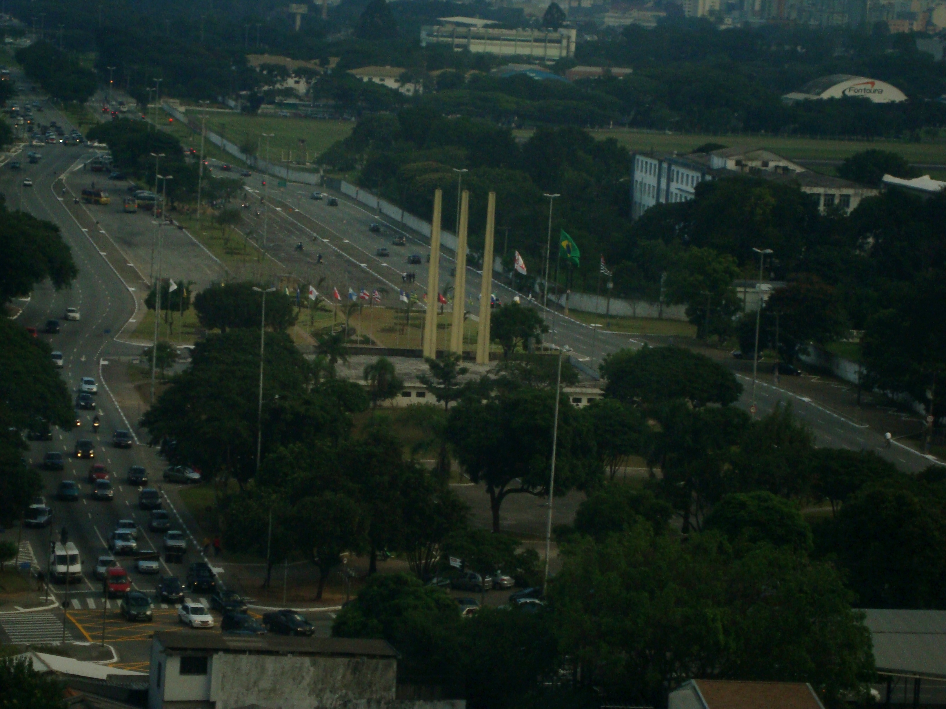 Foto aérea da Praça Heróis da Força Expedicionária Brasileira, bairro de Santana, São Paulo/SP